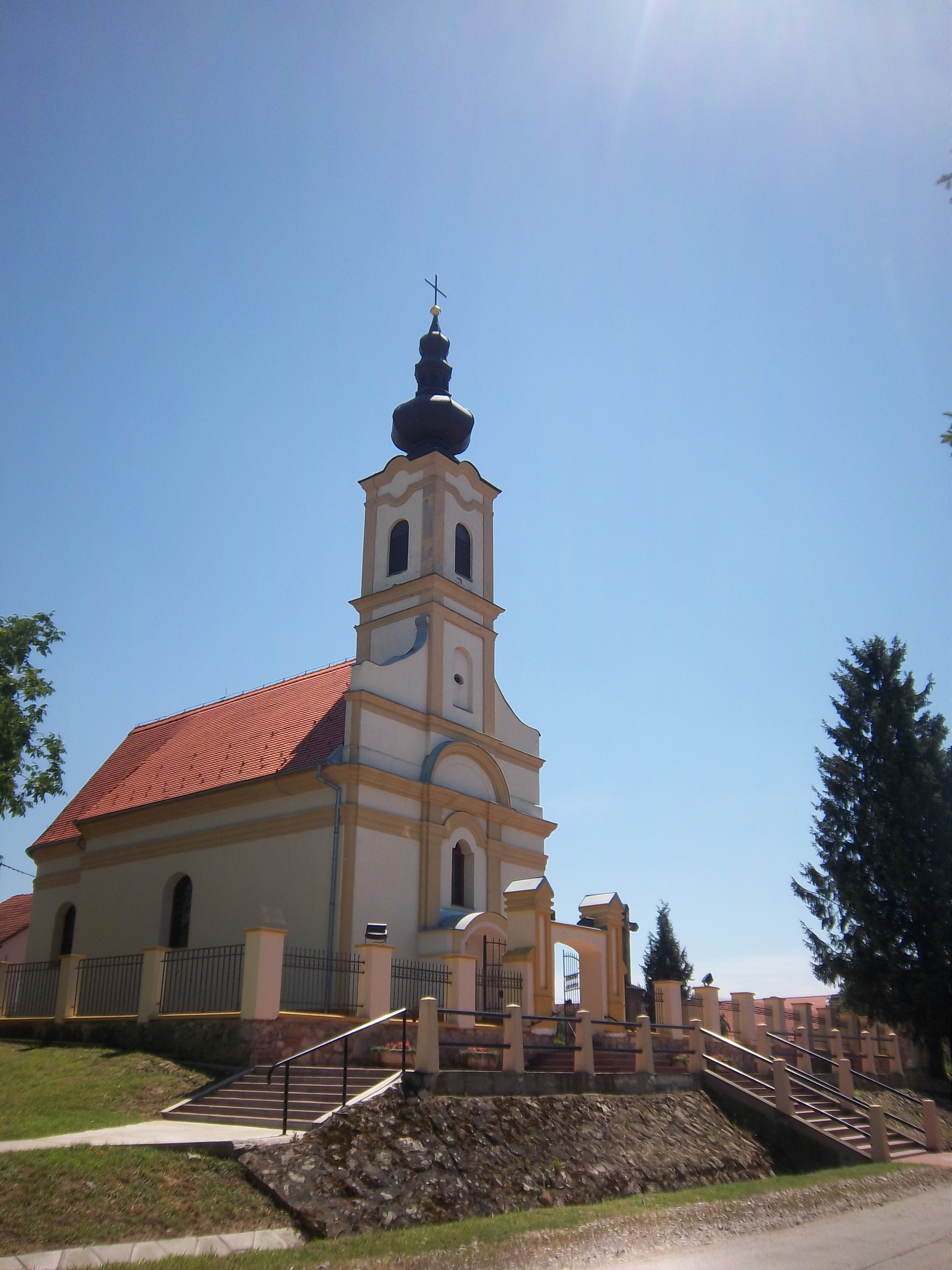 Srpskohrvatski / српскохрватски: Katolička crkva u Slakovcima, Republika Hrvatska